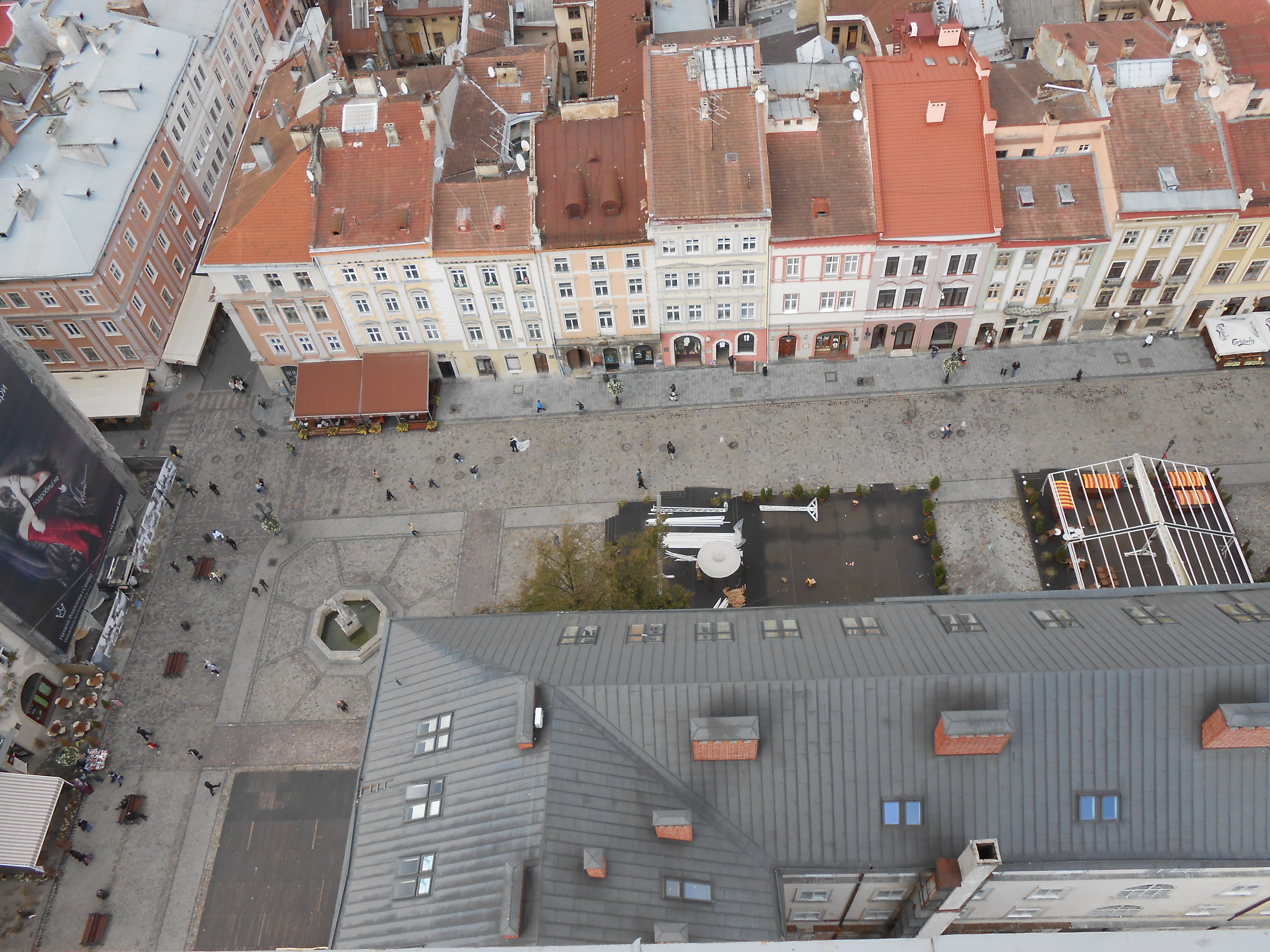 Вид з Ратуші